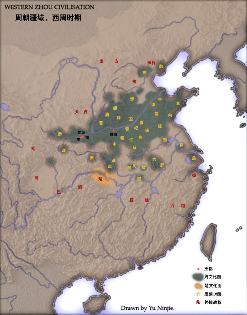 西周初期疆域。